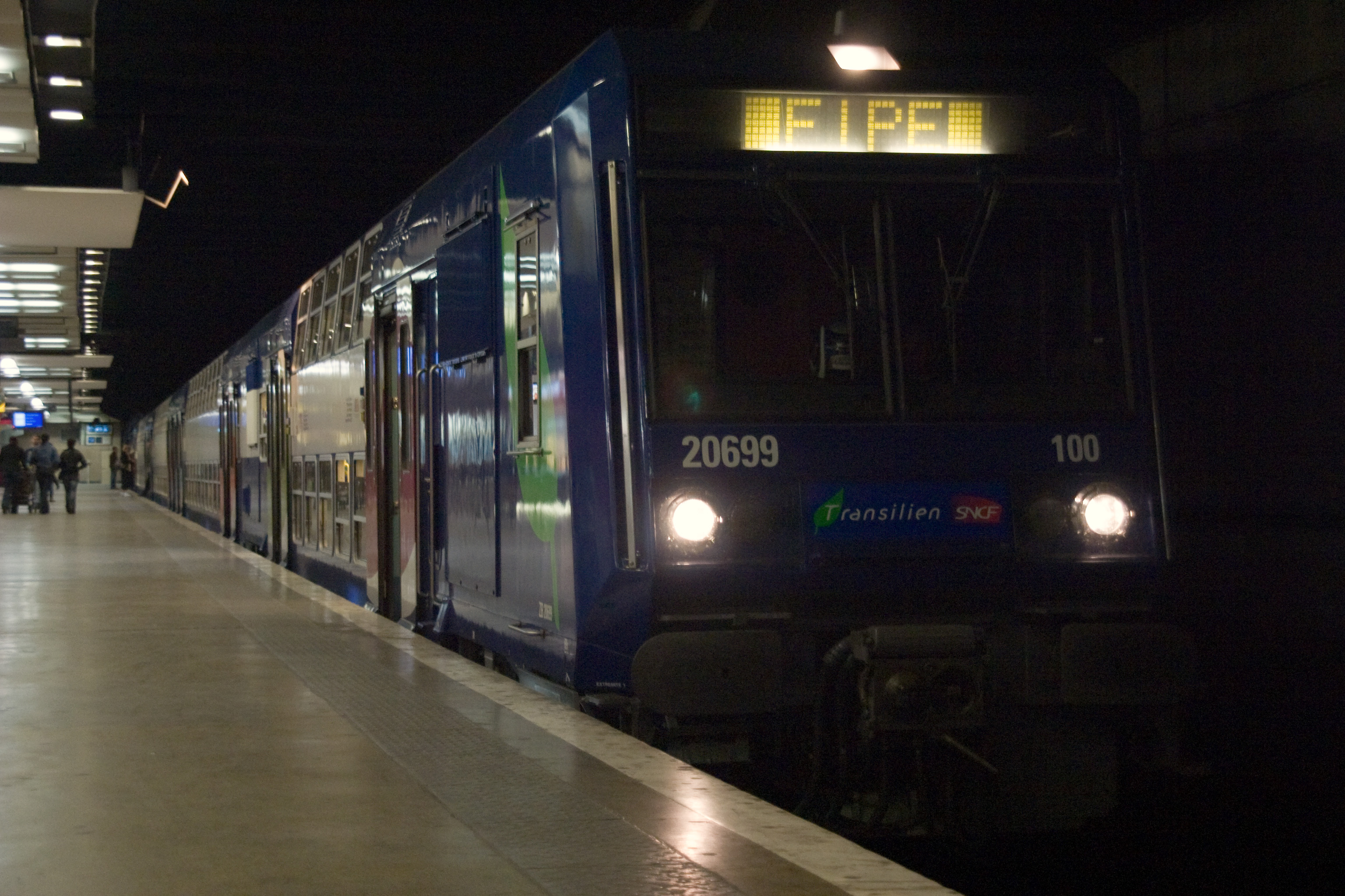 Gare du Nord, Paris, France